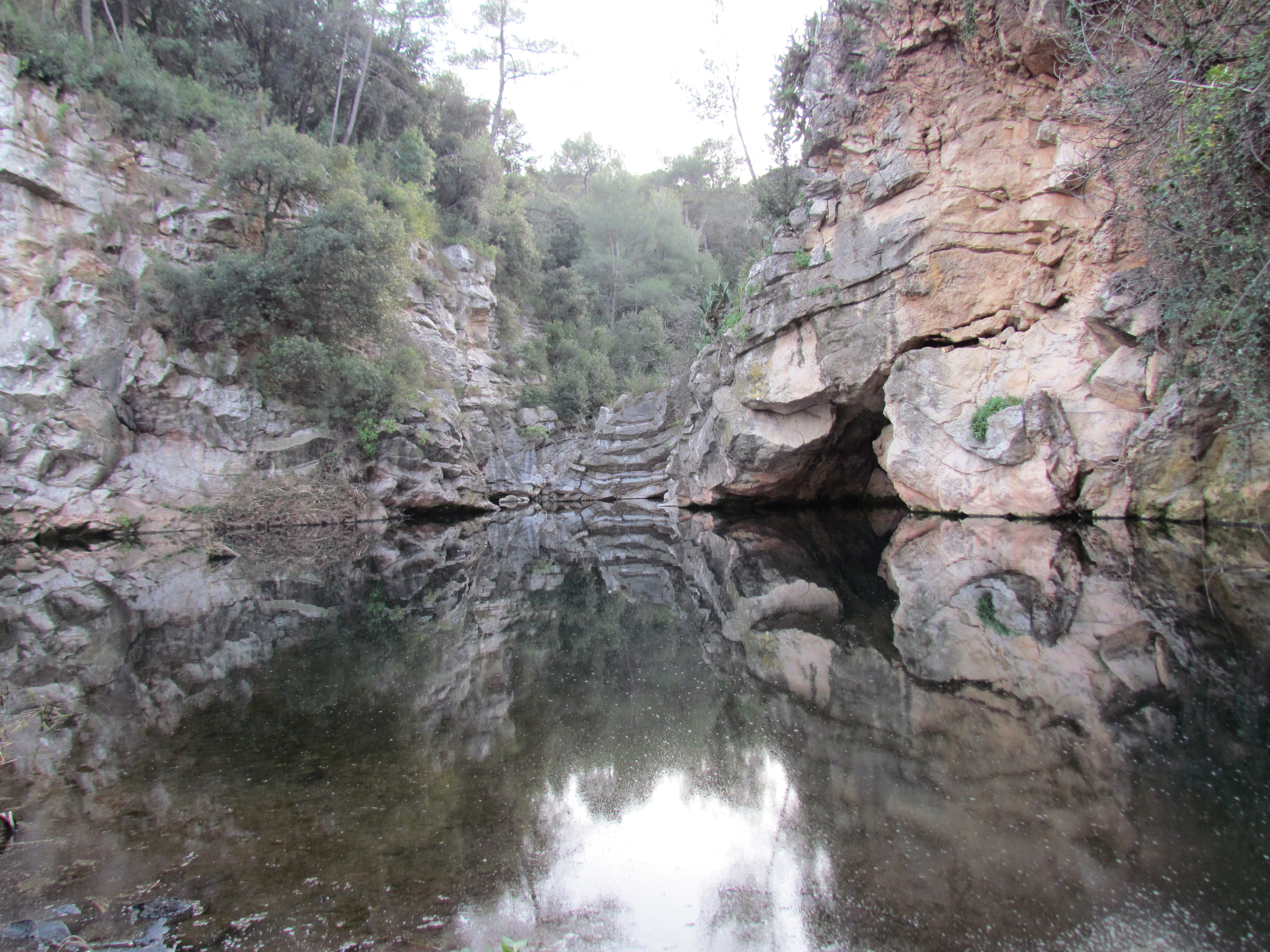 El Gorg d'en Fito a la Malesa